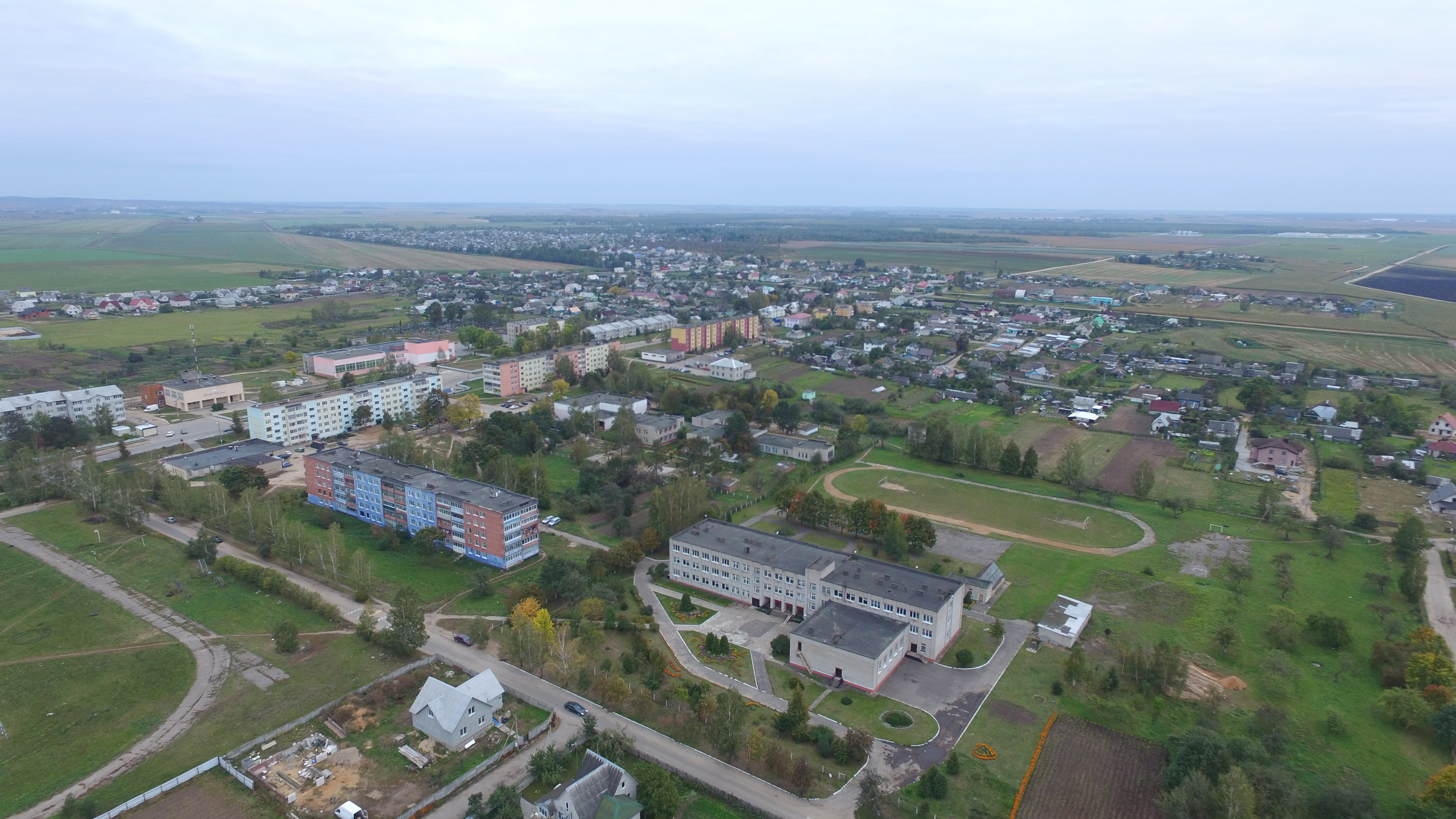 Замосточье (Минский район)